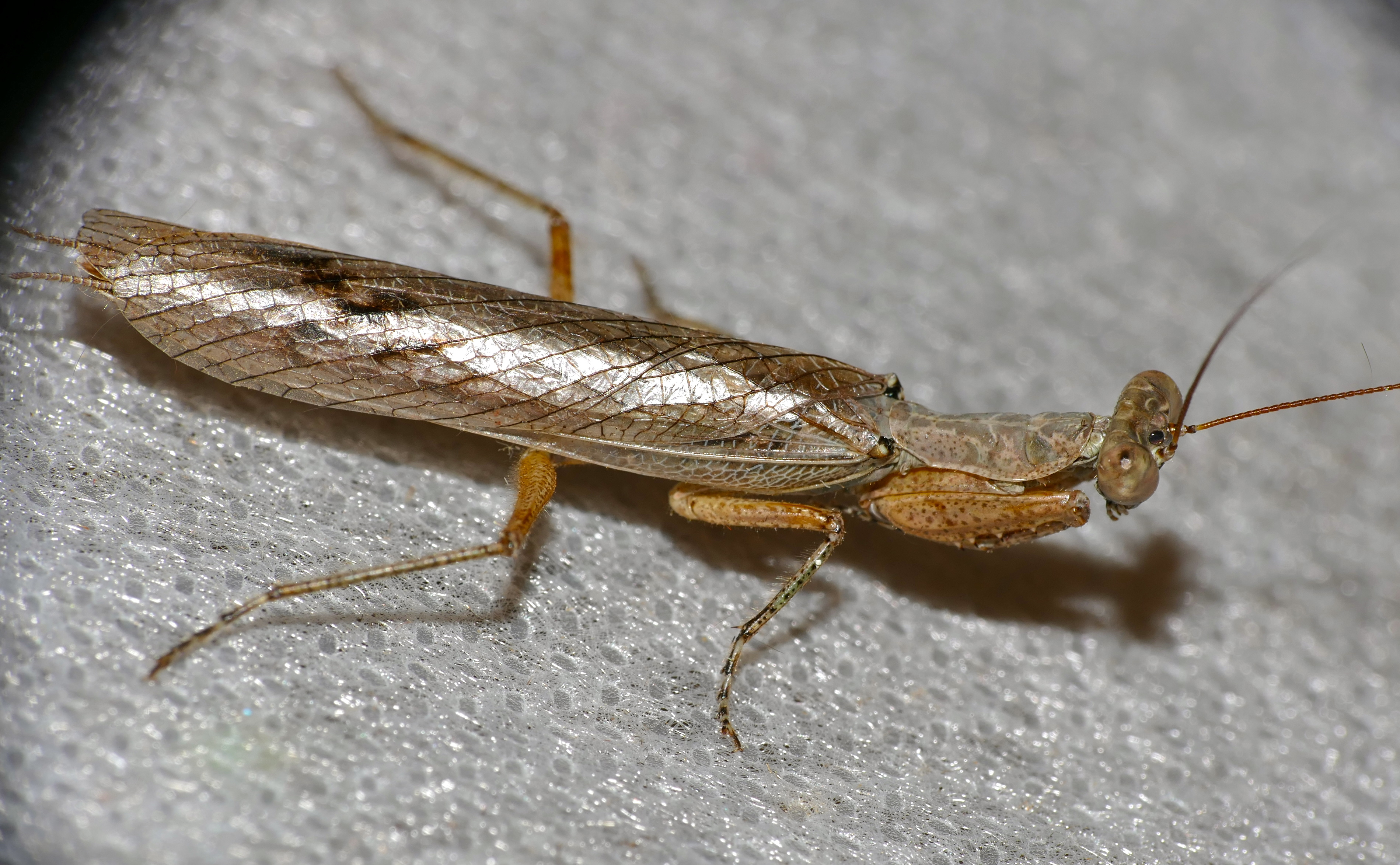 Letaba Camp, Kruger NP, SOUTH AFRICA